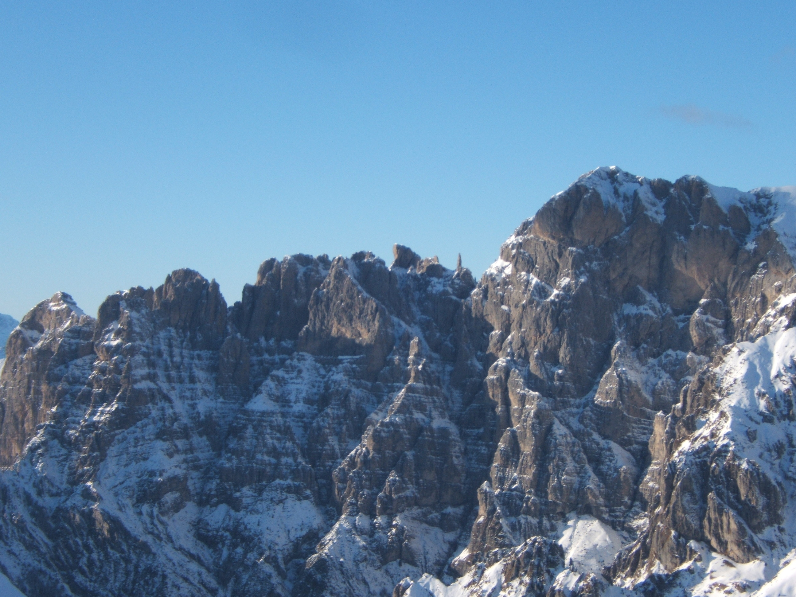 foto scattata da Armandoria